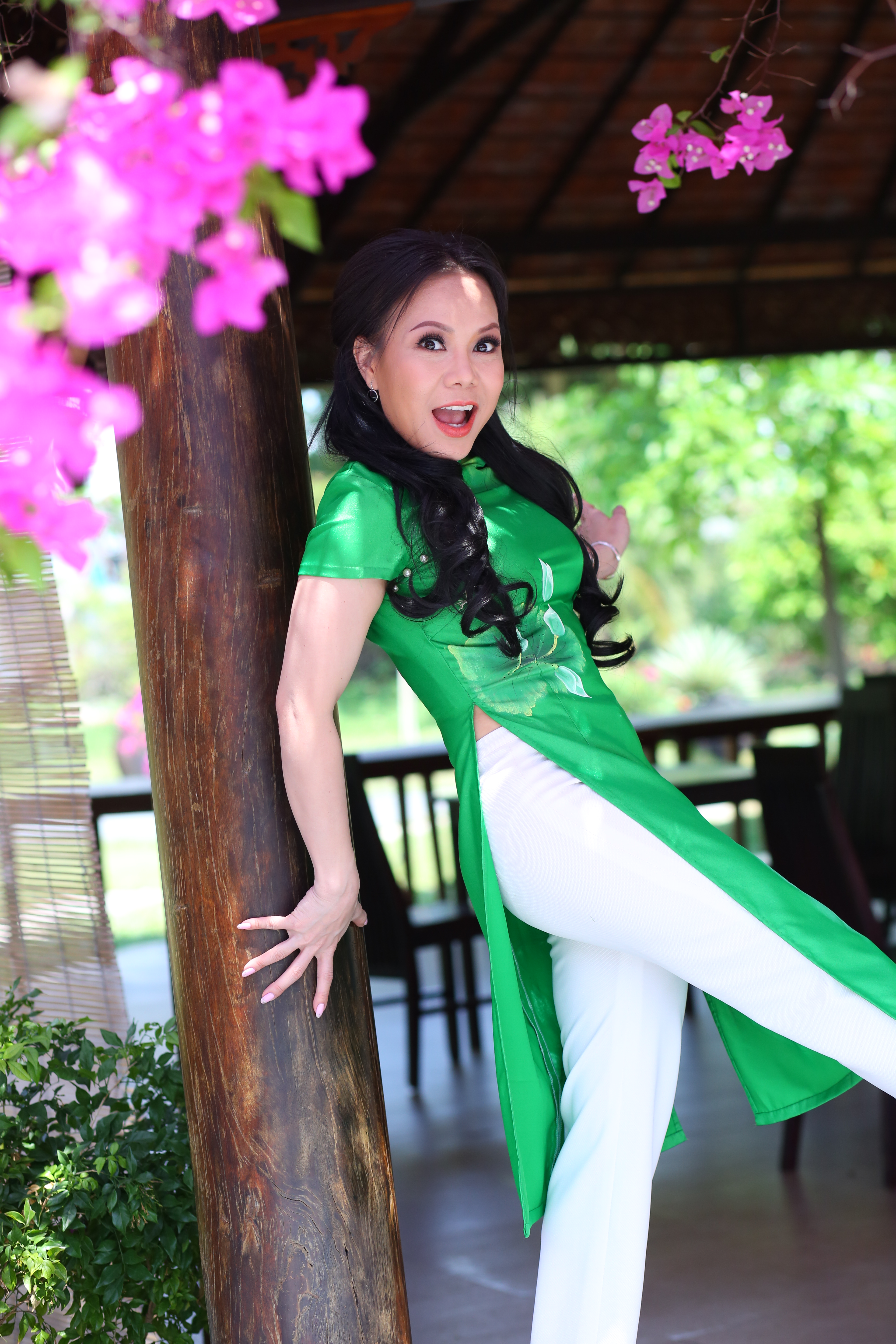 Việt Hương dí dỏm trong áo dài xanh